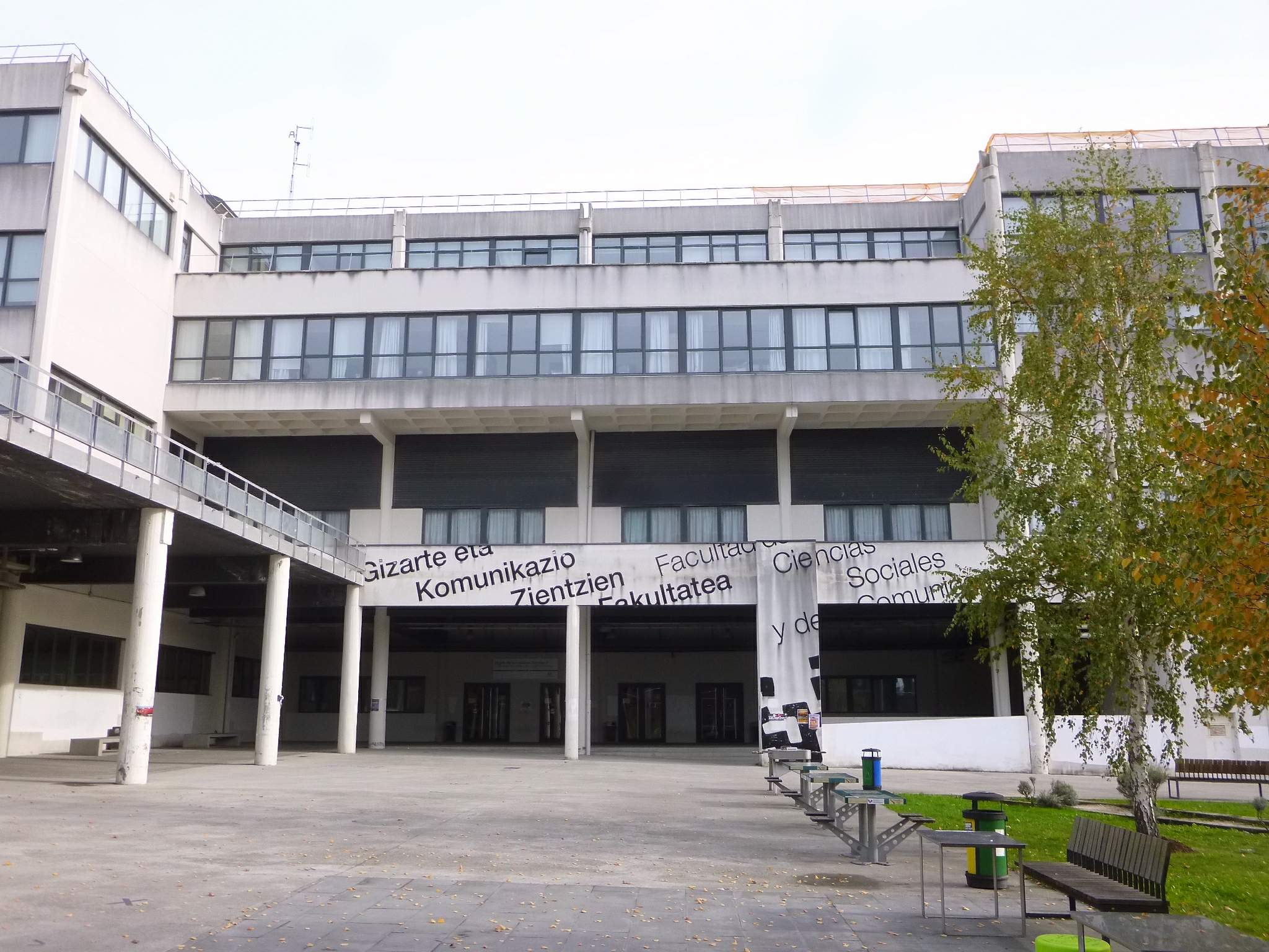 Lejona - Campus de Bizkaia de la UPV-EHU - Facultad de Ciencias Sociales y de la Comunicación